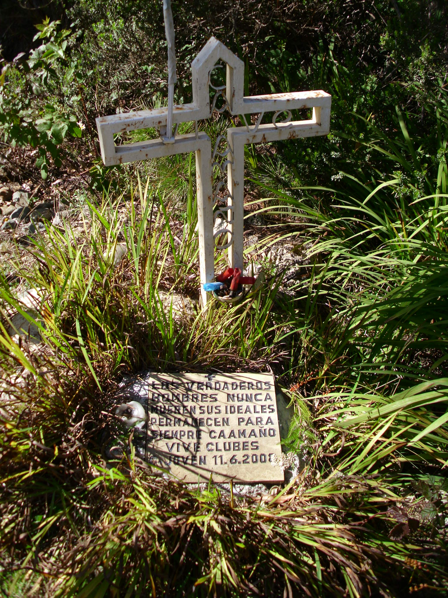 Eerste Caamaño gedenkteken bij het monument in het nationaal park Valle Nuevo, dicht bij de Piramide